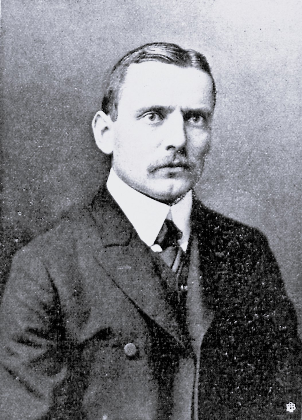 Senator Dr. Kalkbrenner.